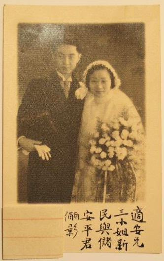 储安平、端木露西结婚照